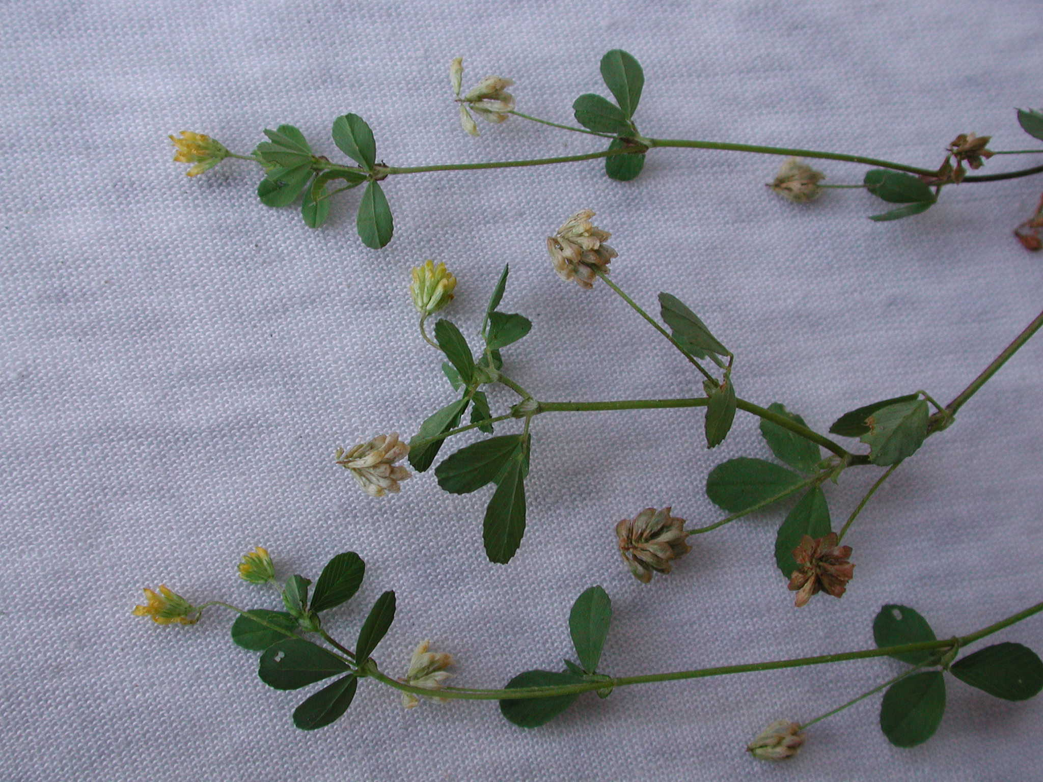 Infiorescenze di Trifolium dubium